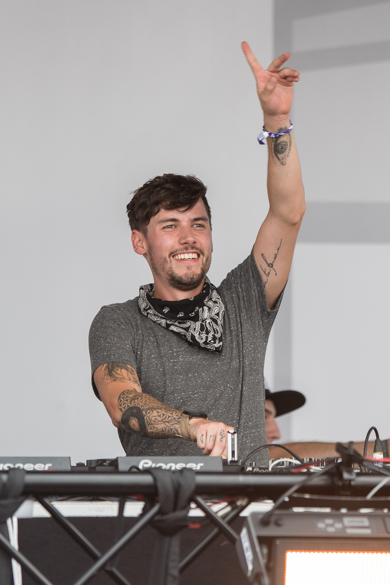 Chris Stritzel,Festival,Konzert,Le Shuuk,Livekonzert,Livemusik,Mainstage,Musik,Open Beatz 2016